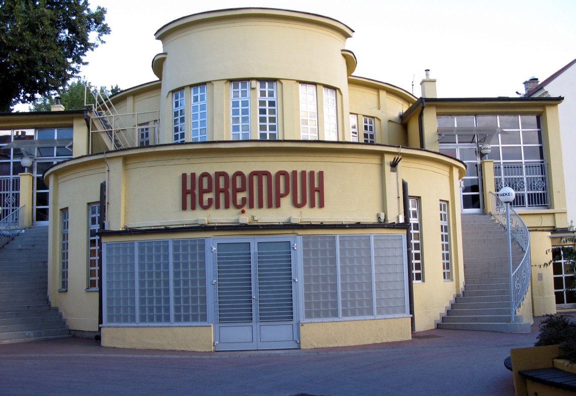 kazalište Kerempuh, Zagreb